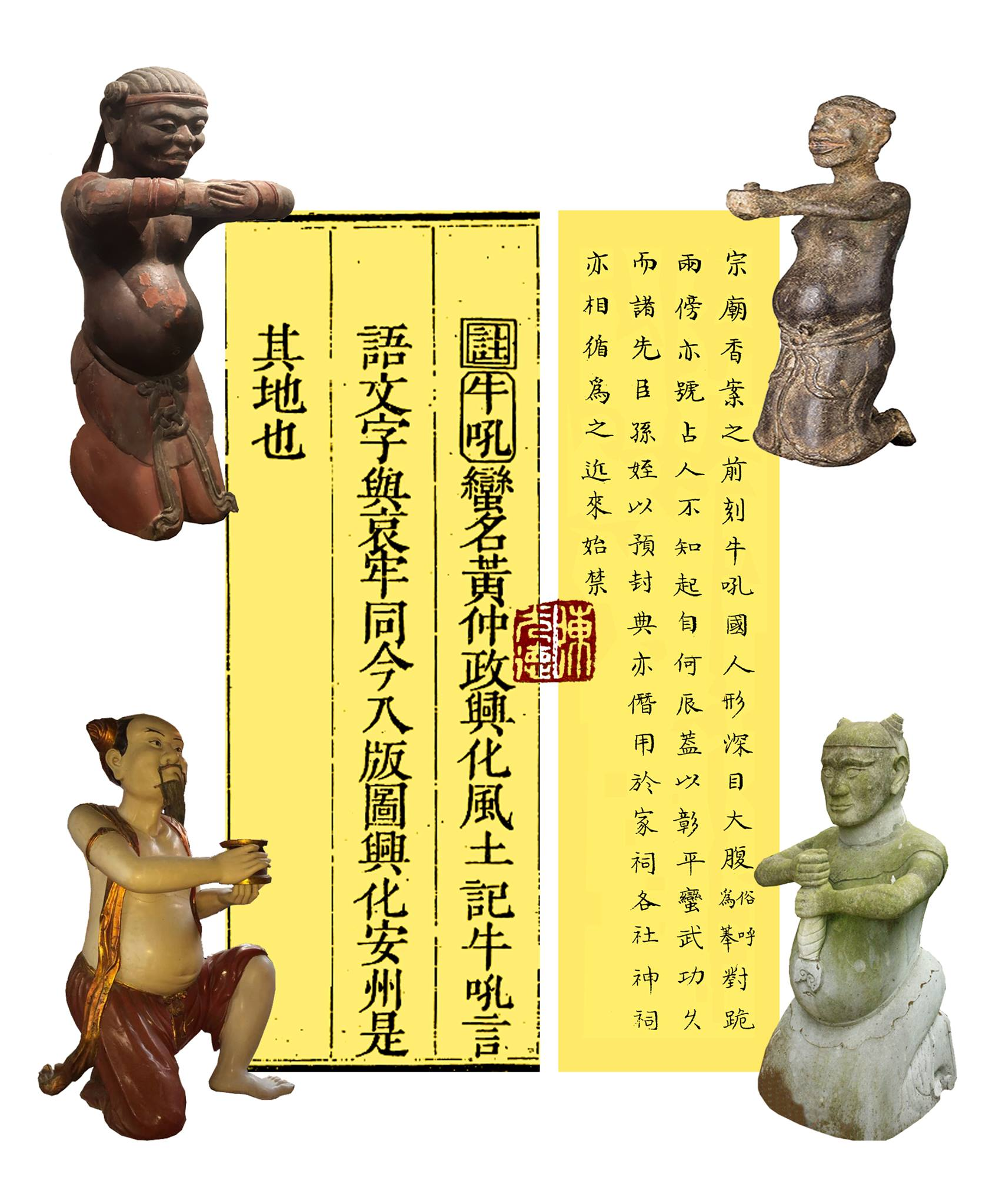 Vân-trai tòng-thoại chi Phỗng.